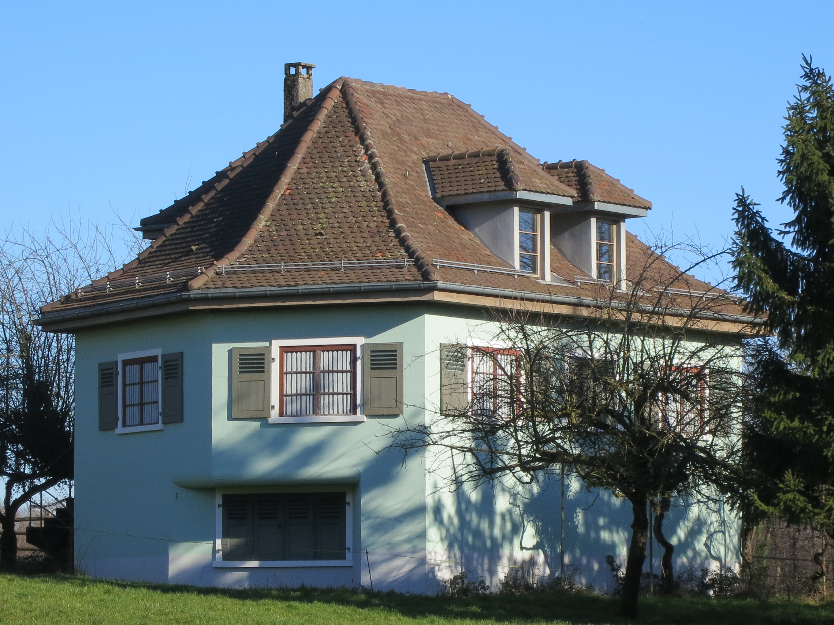 Villa Verte, Gland VD, Schweiz